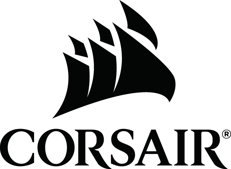 Das überarbeitete "Sails" Logo von Corsair seit Juni 2015.